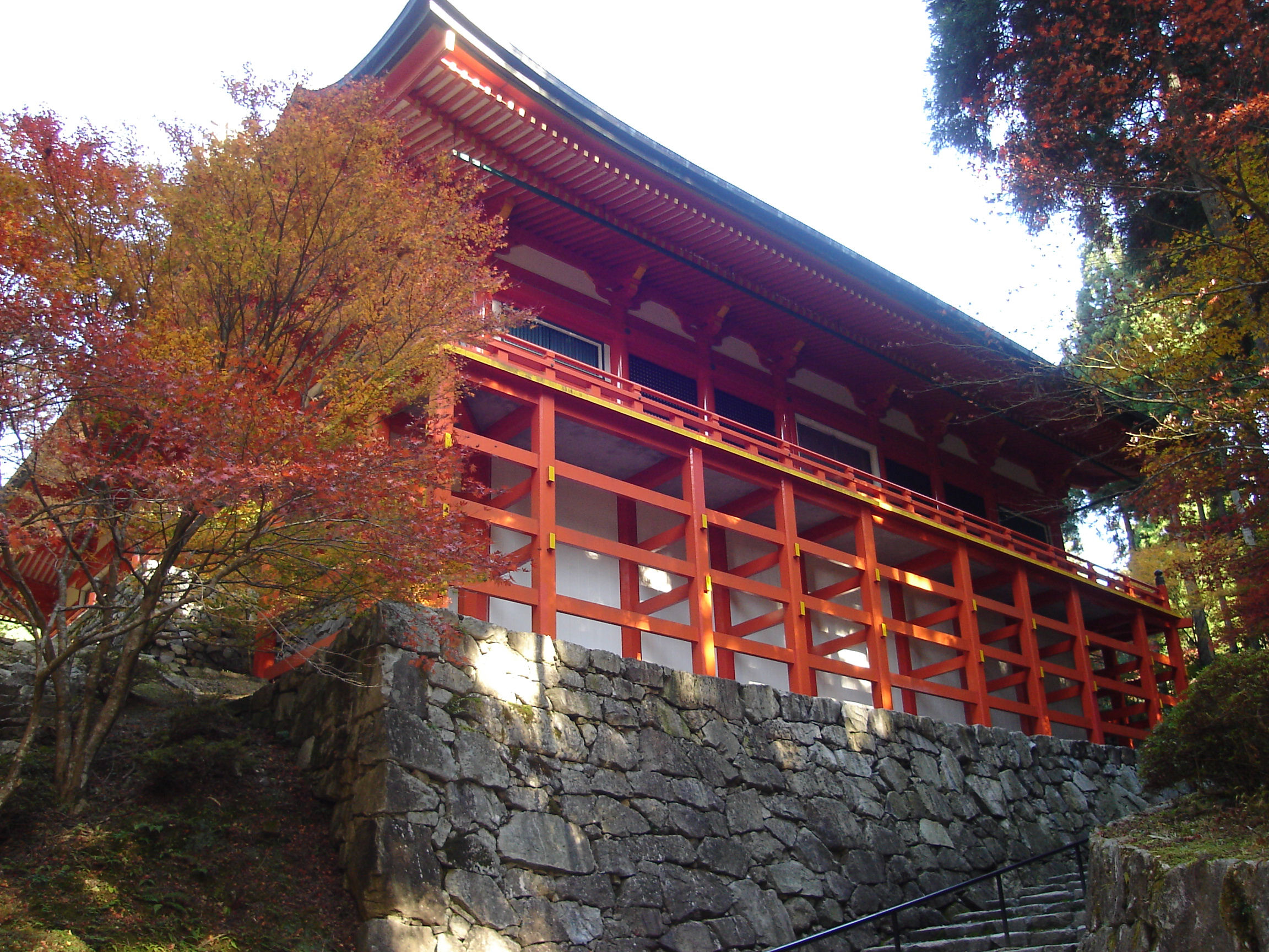 Enryakuji yokawachudou , siga japan